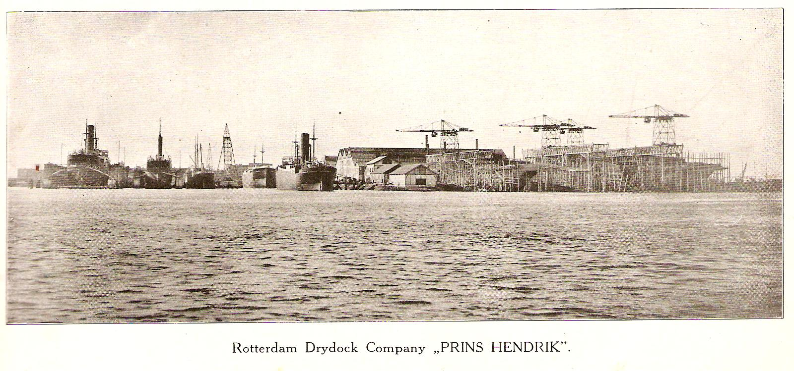 Rotterdam Drydock Company Prins Hendrik dock bron: G Dirkzwager M.Zoon's Guide to the New-Waterway for 1918 forty-fourth year printed and published since 1874 by G.B. 't Hooft, Rotterdam het boek behoort tot mijn persoonlijke collectie